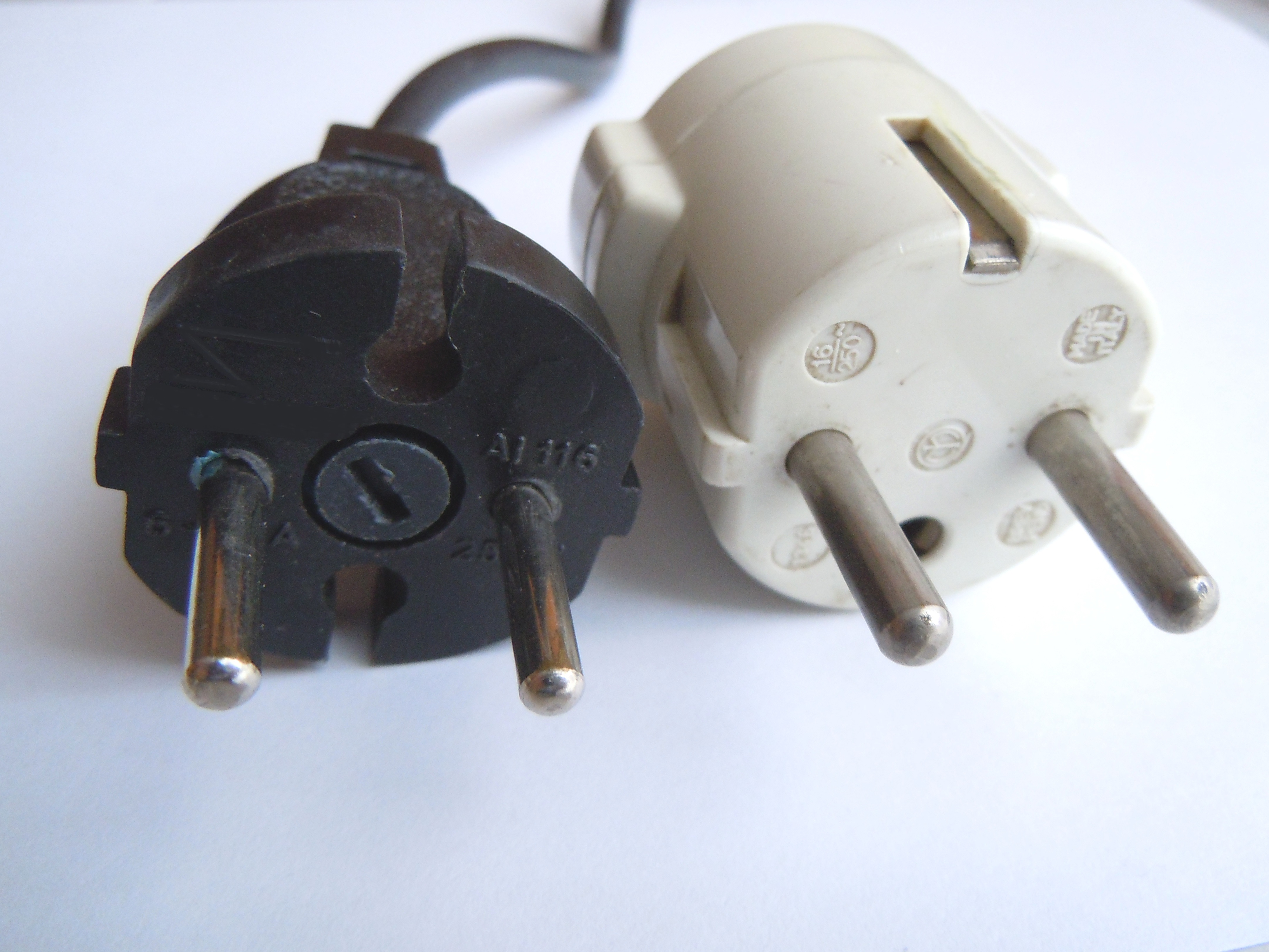 spina elettrica di tipo GOST 7396 (russa) a confronto di una di tipo CEE 7/7 (tedesca); in particolare viene confrontata la dimensione differente degli spinotti.